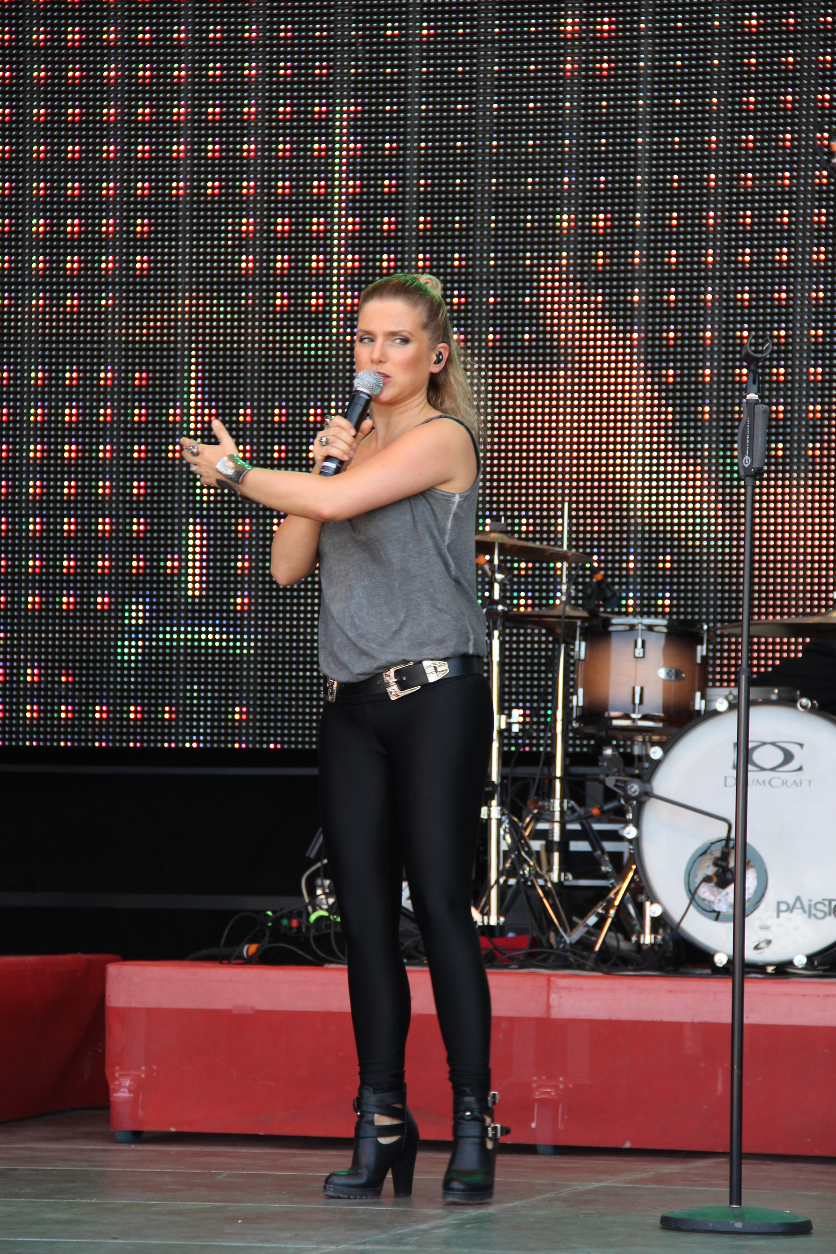 Jeanette Biedermann tritt mit ihrer Band Ewig bei REWE Family am 09.07.2016 auf dem Cannstatter Wasen in Stuttgart auf.